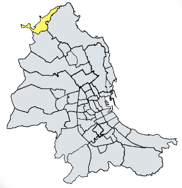 Sferracavallo